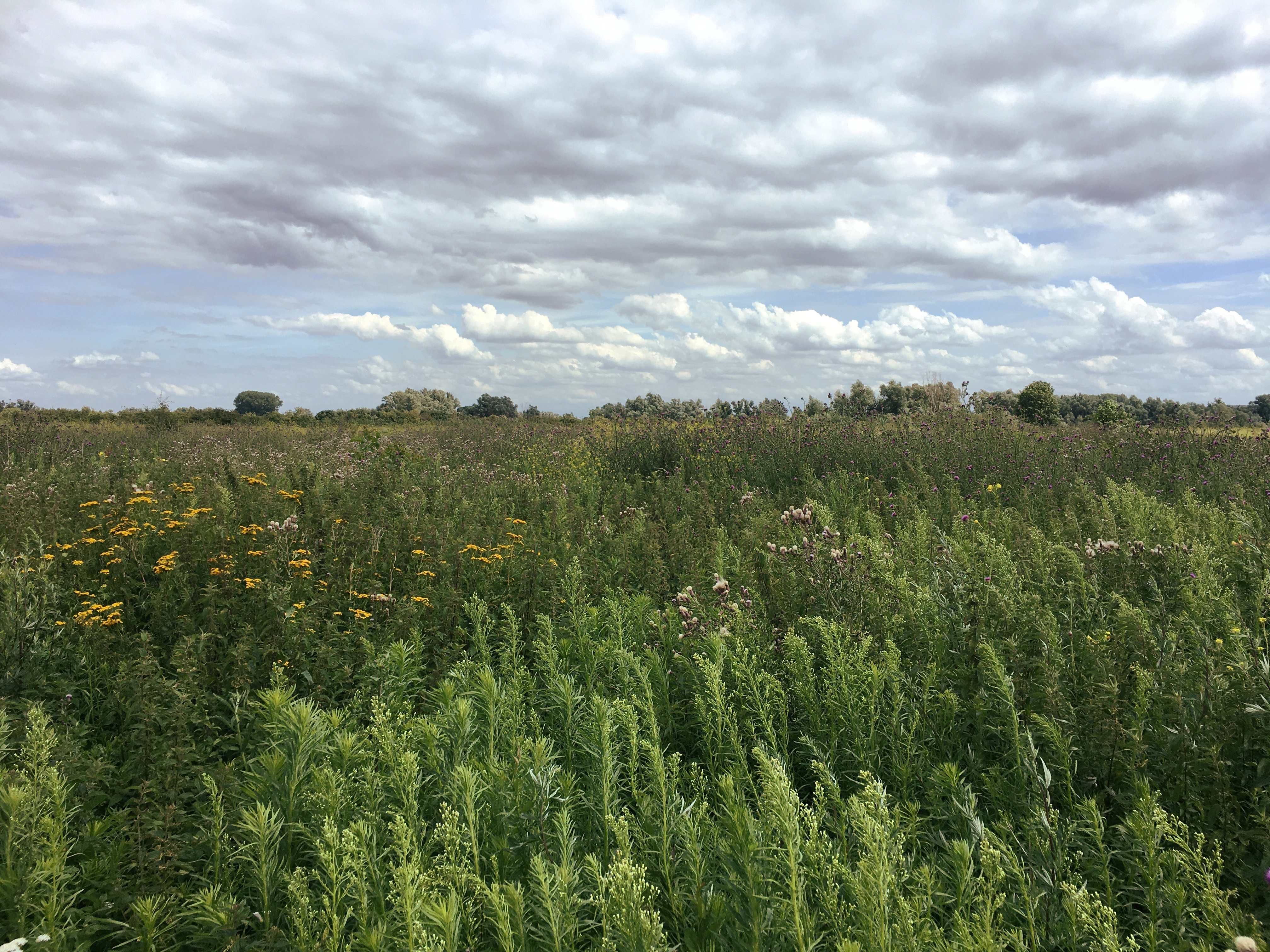 Een ruigte (vegetatie) nabij de rivier de Waal